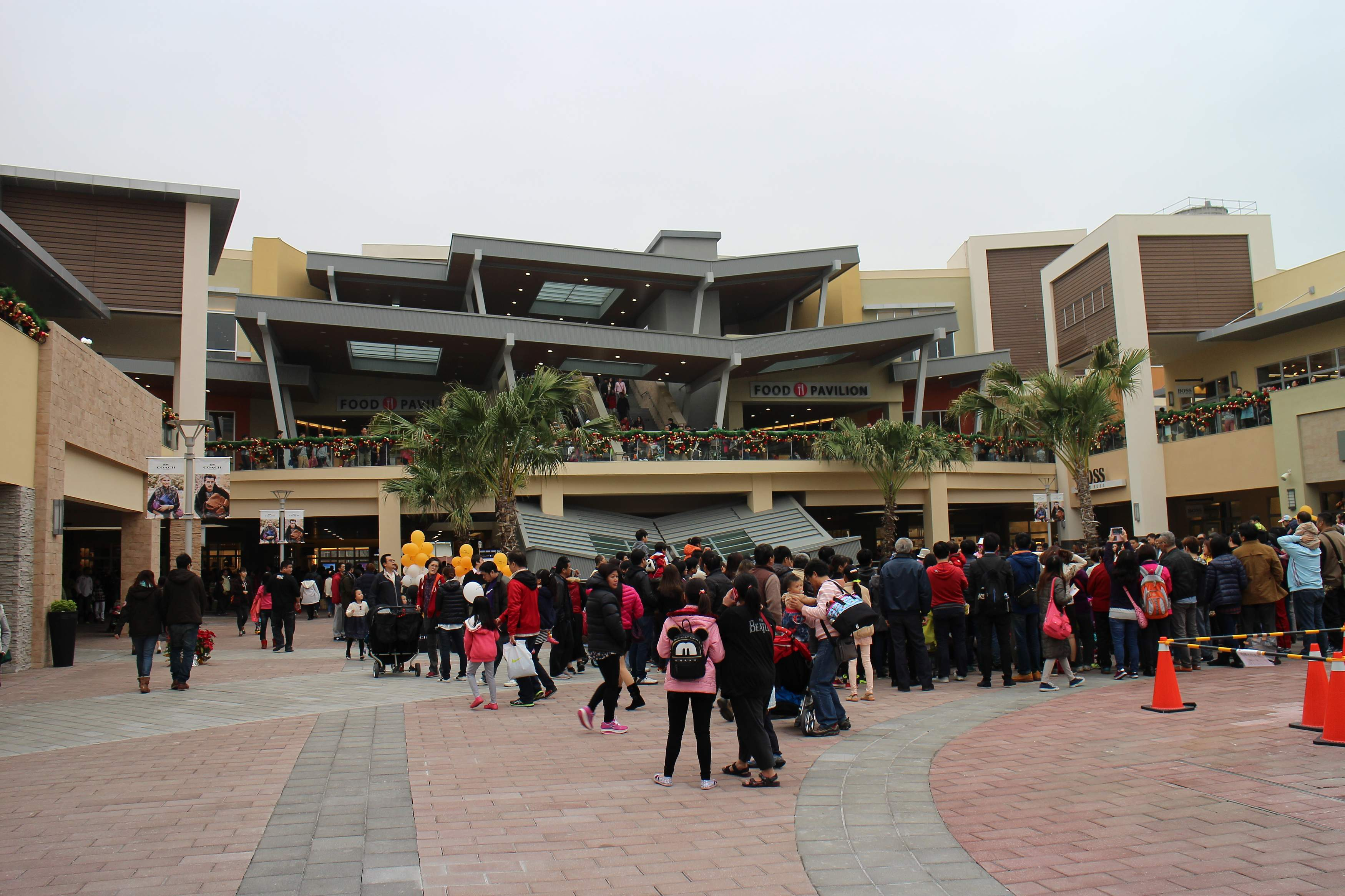 位於桃園高鐵站旁的華泰名店城Outlet